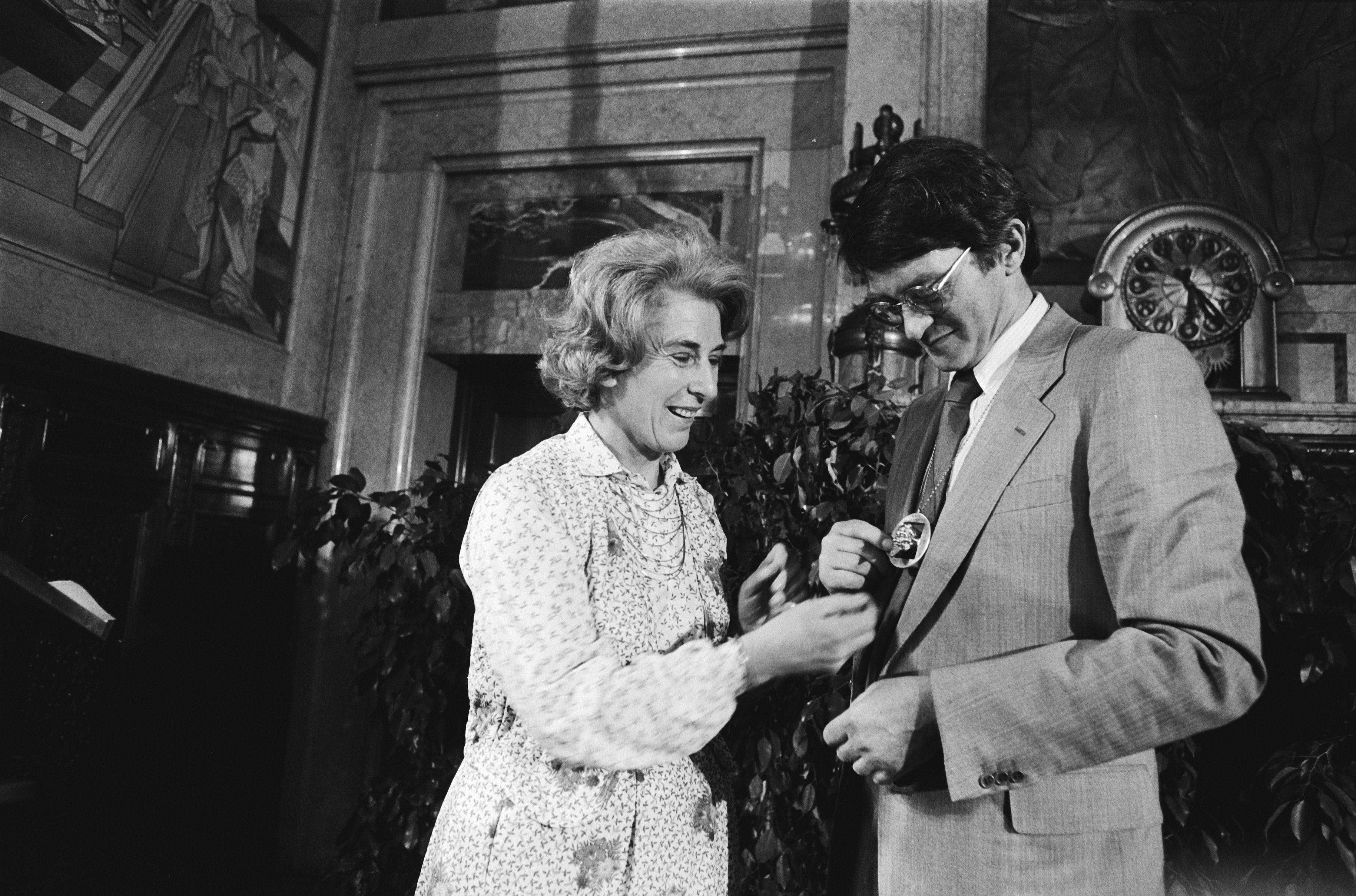 Minister Gardeniers overhandigt Remco Campert in het stadhuis van Rotterdam de P.C. Hooftprijs 1976 (16 juni 1979)